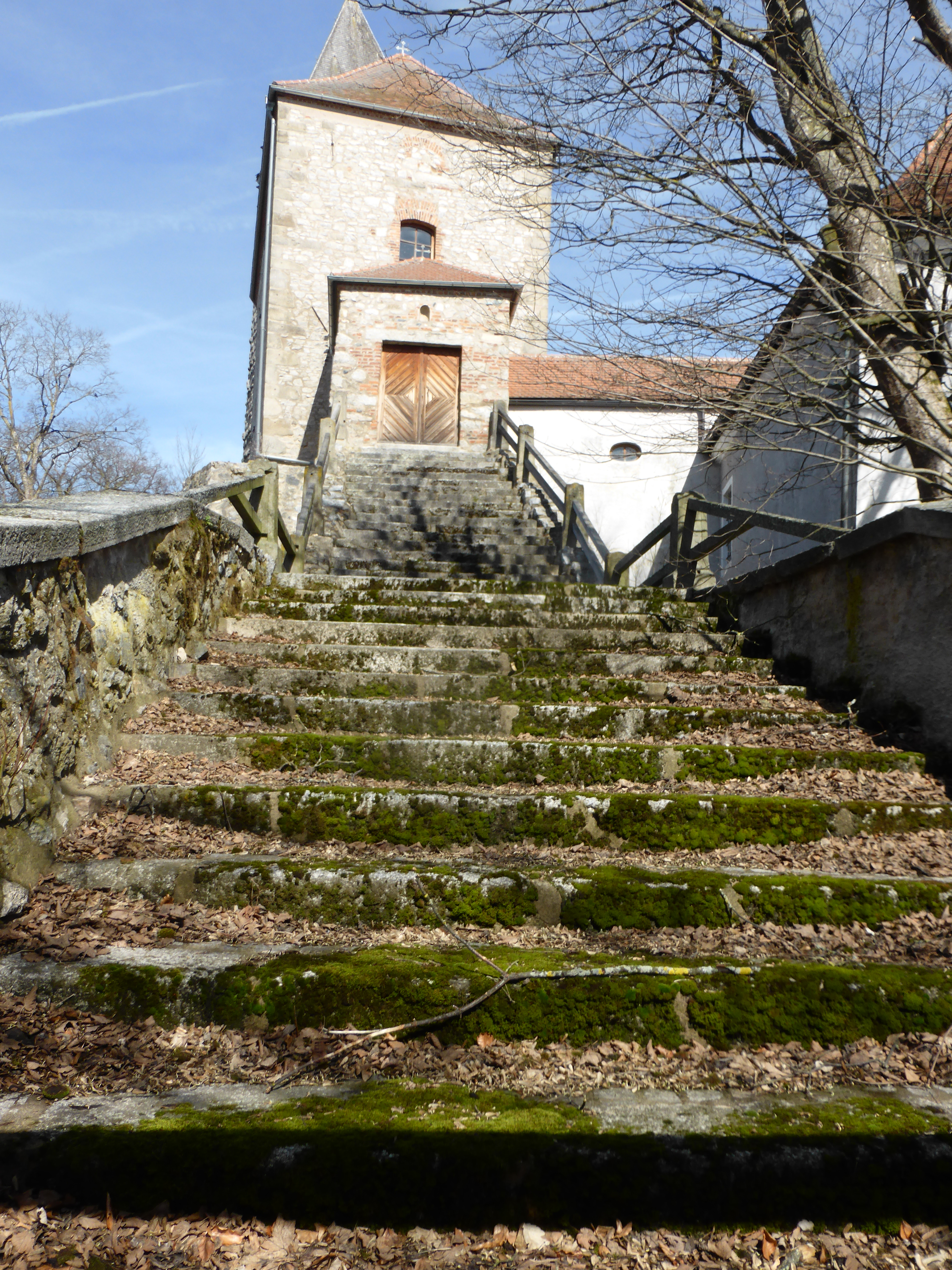 Burg Waldau (Vohenstrauß)